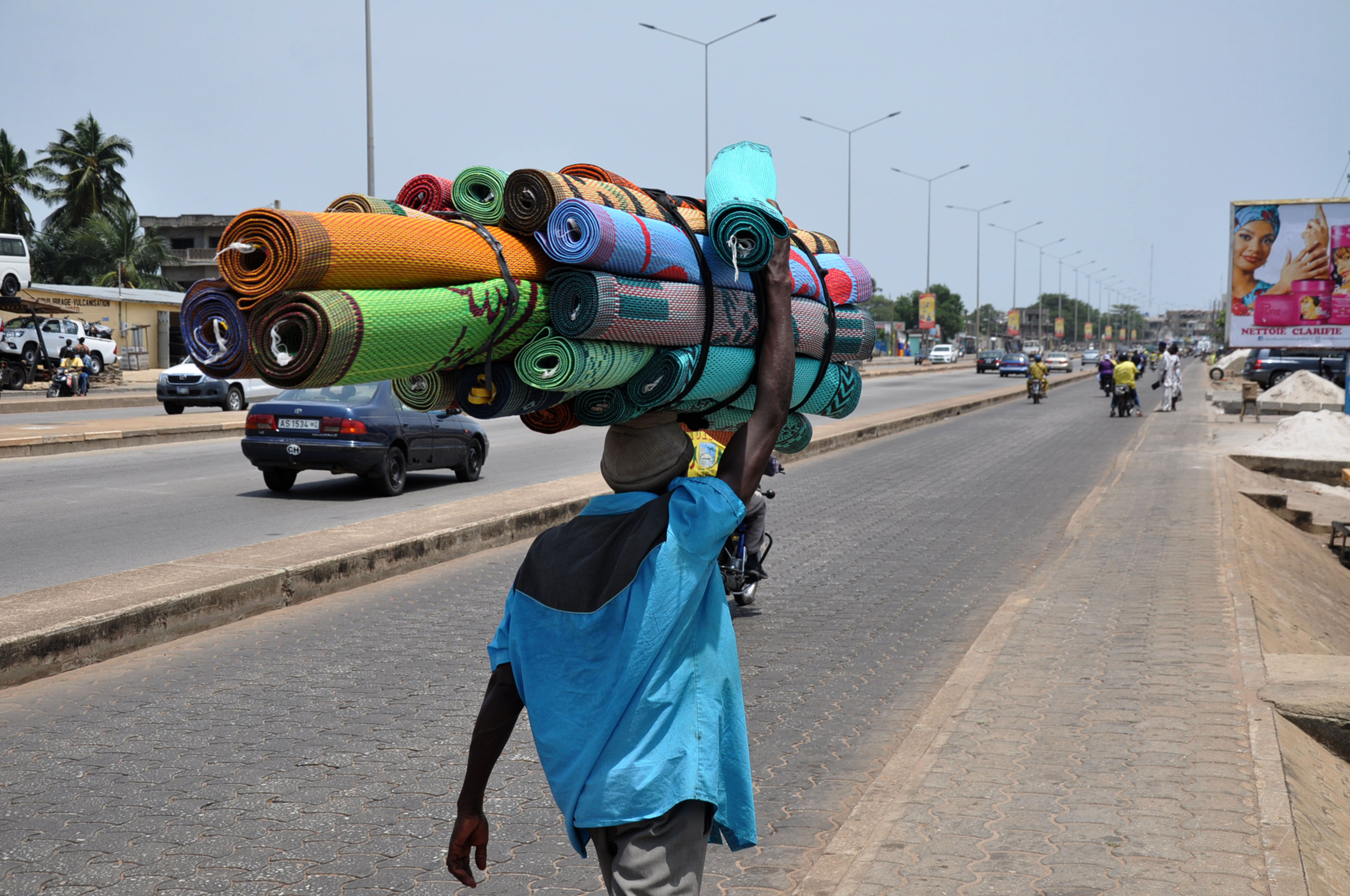 over several kilometers, Nigeriens living in Benin struggle to make a living This is an image with the theme "Africa on the Move or Transport" from: Benin